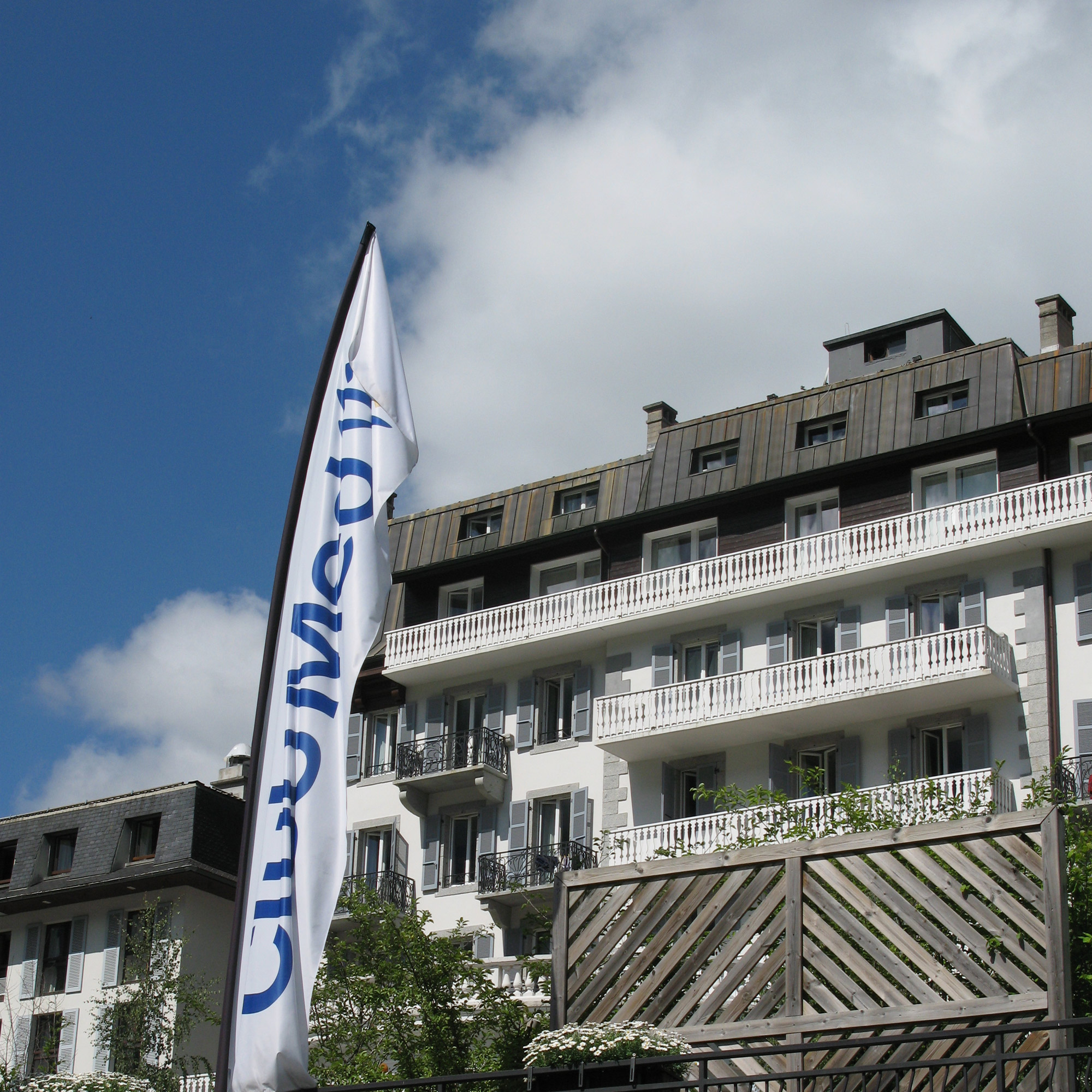 bâtiment principal du Club Méditerranée de Chamonix dans les alpes